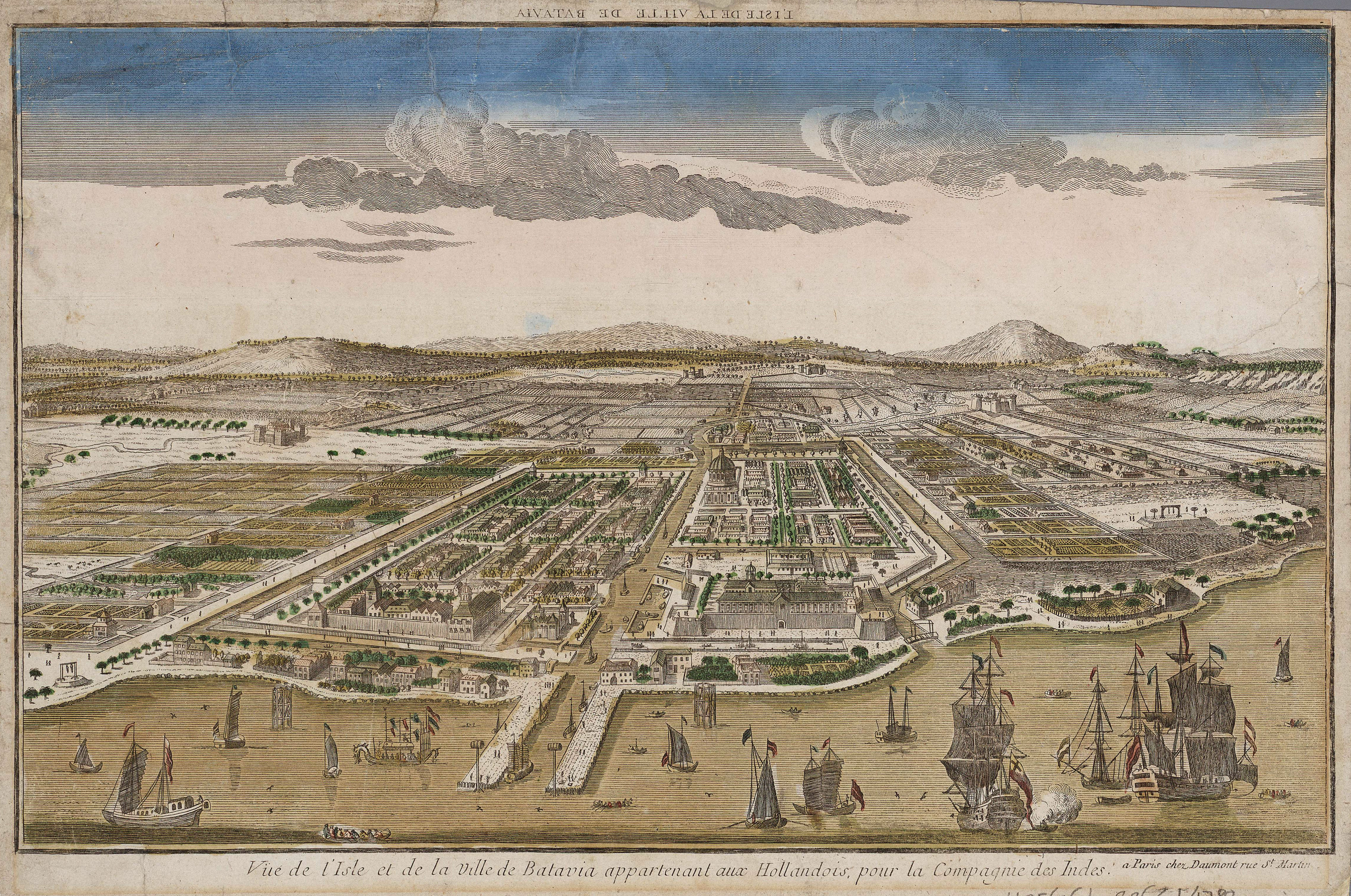 Vue de l'isle et de la ville de Batavia appartenant aux Hollandois, pour la Compagnie des Indes; Daumont, Paris c. 1780; 25 x 39 cm